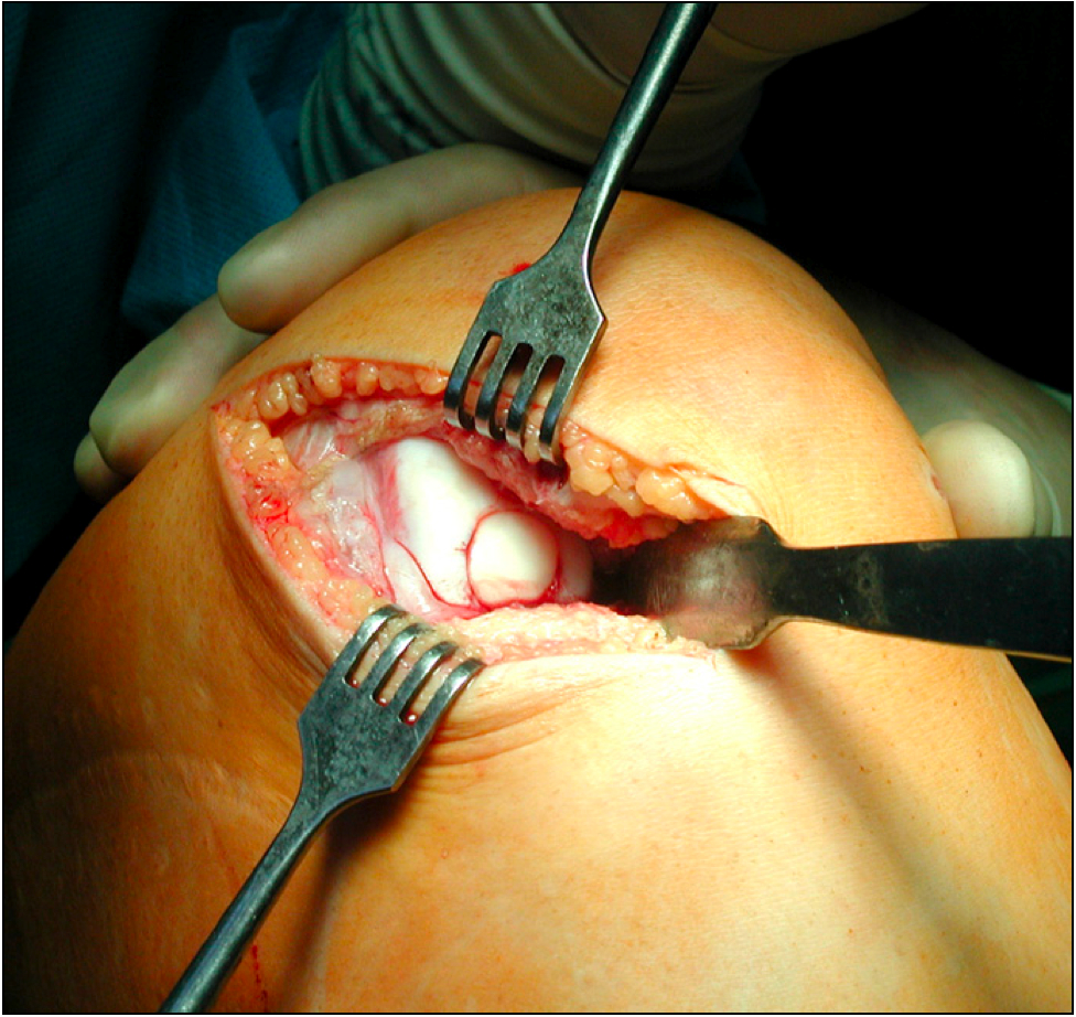 Osteochondrales Transplantat implantiert